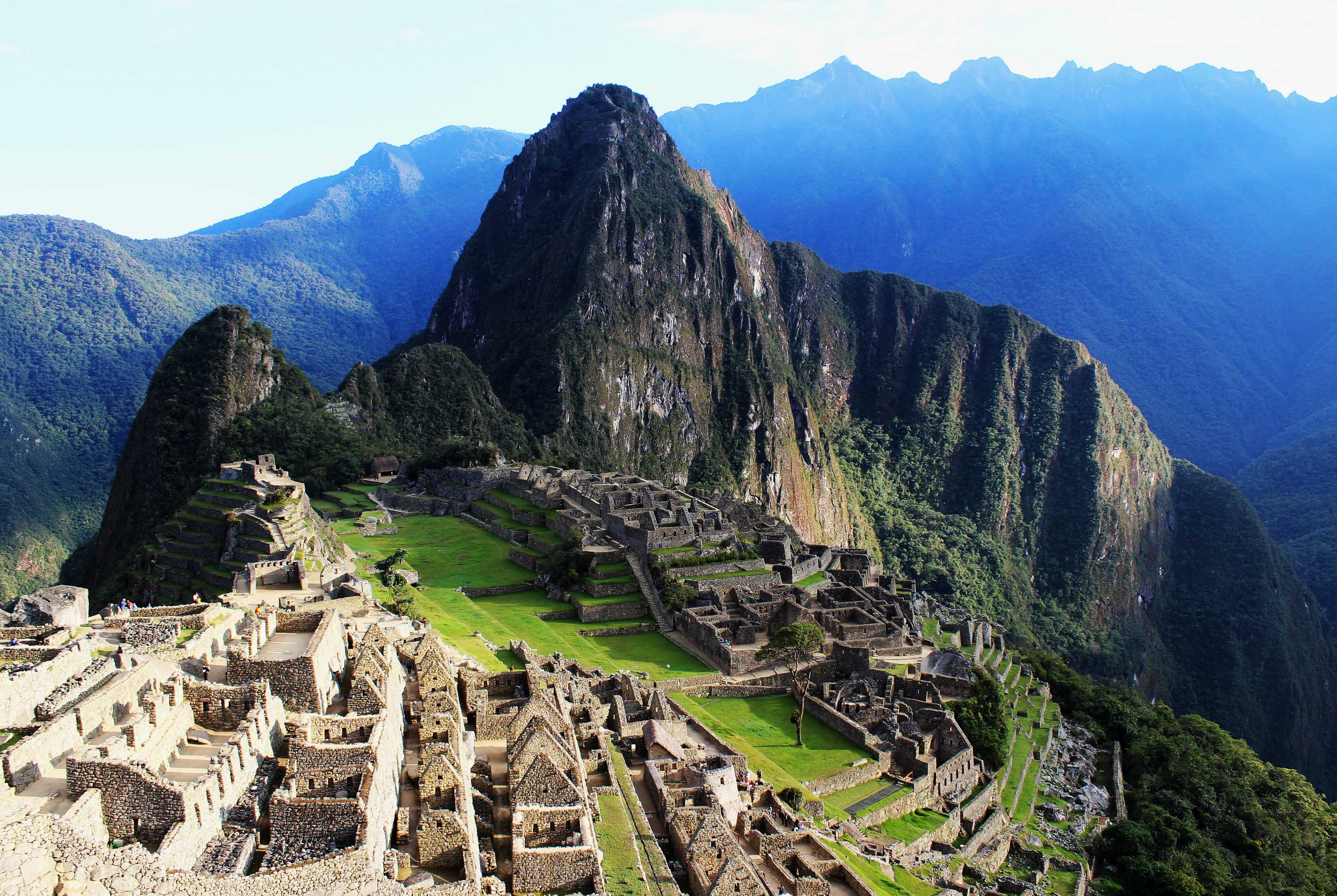 Machu Picchu (Peru)